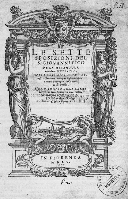 Frontespizio dell'Heptaplus (Le sette sposizioni del S. Giovanni Pico de la Mirandola intitolate Heptaplo), 1555